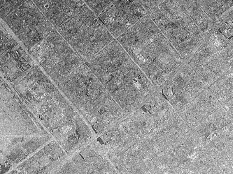 1945年8月11日原爆投下後の八丁堀周辺。中央を横断するのが相生通り。